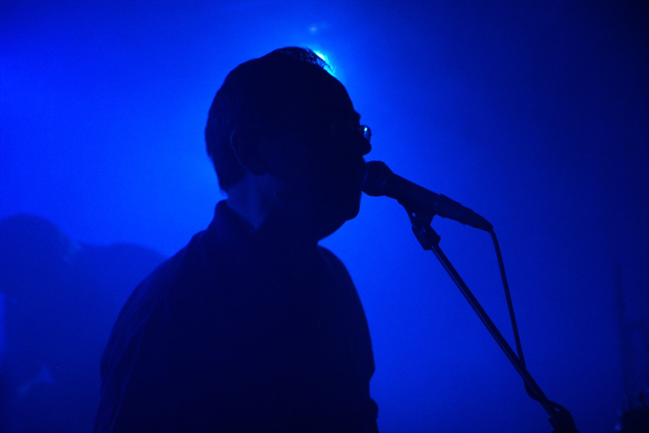 Concert de Charles de Goal au Glas'Art le 8 février 2007 : Patrick Blain à contre jour